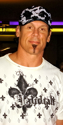 Sting aka Steve Borden after a TNA event.